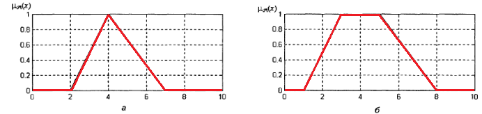 рисунок 4